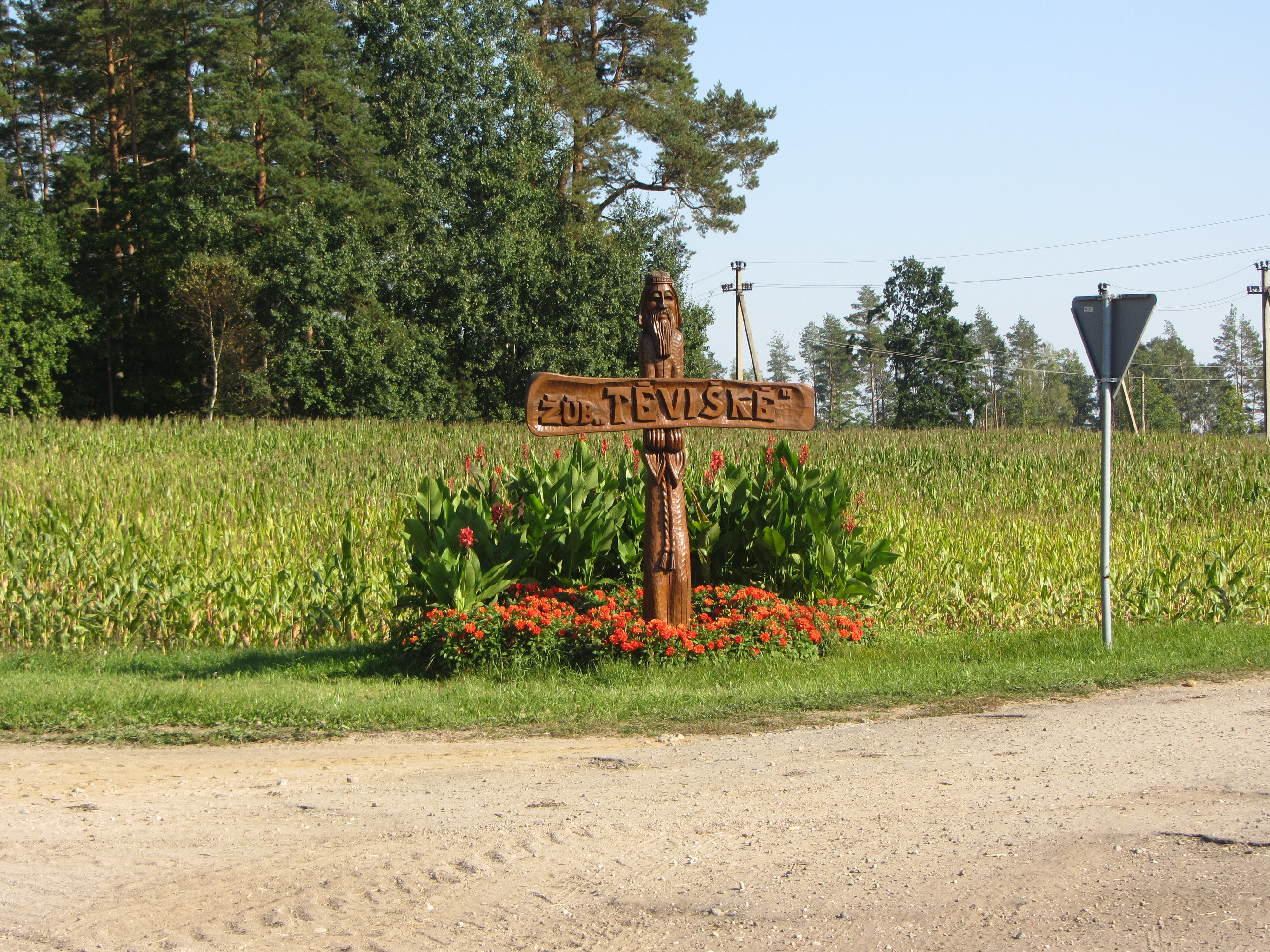 Puodžiai, Lithuania